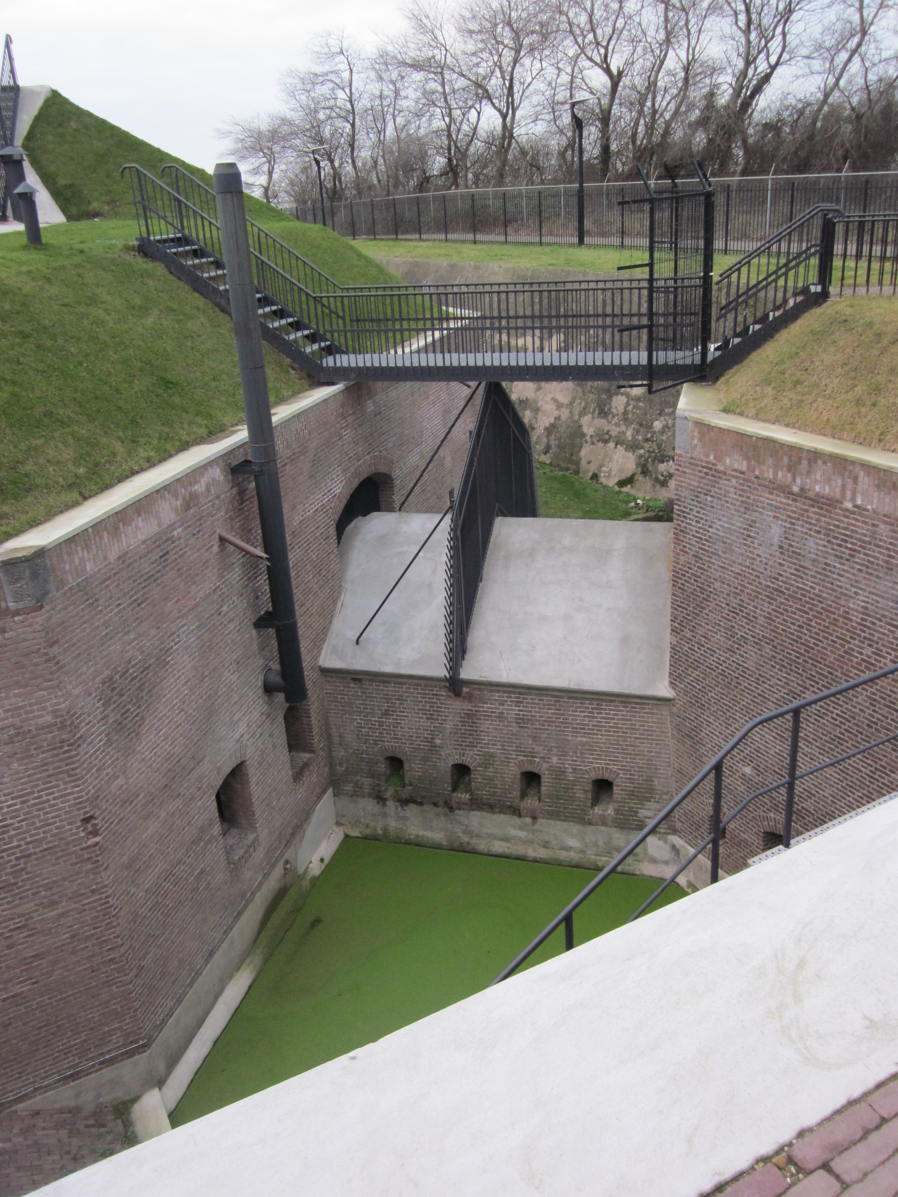 Een van de twee holle beren van het Fort aan den Hoek van Holland, Nederland. Aan weerszijde van de holle beer bevindt zich een kleine natte gracht, die dient ter verdediging en voor opslag van regenwater.